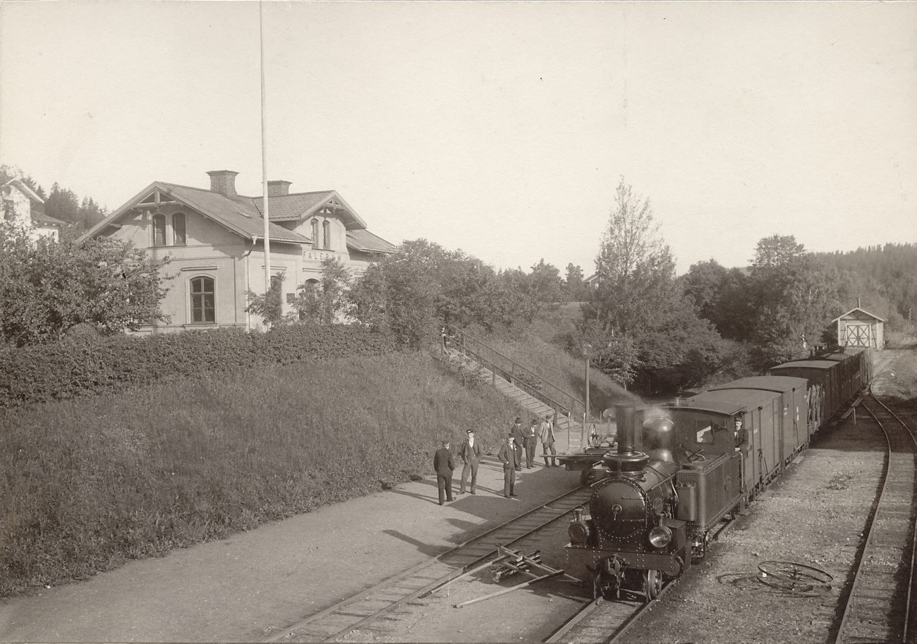 B4096. Falerums järnvägsstation i Norra Tjust, Gärdserums församling. Fotografiet vann pris i Svenska Turistföreningens pristävlan 1902. Bilden skänkt till Tekniska museet av Svenska Turistföreningen.